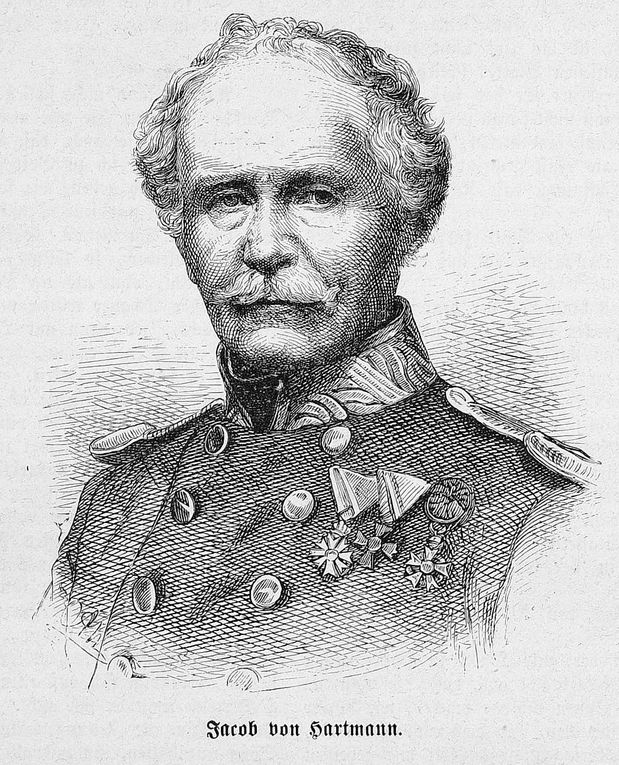 Bild von Seite 029 der Zeitschrift Die Gartenlaube. Image from page 029 of journal Die Gartenlaube, 1871.